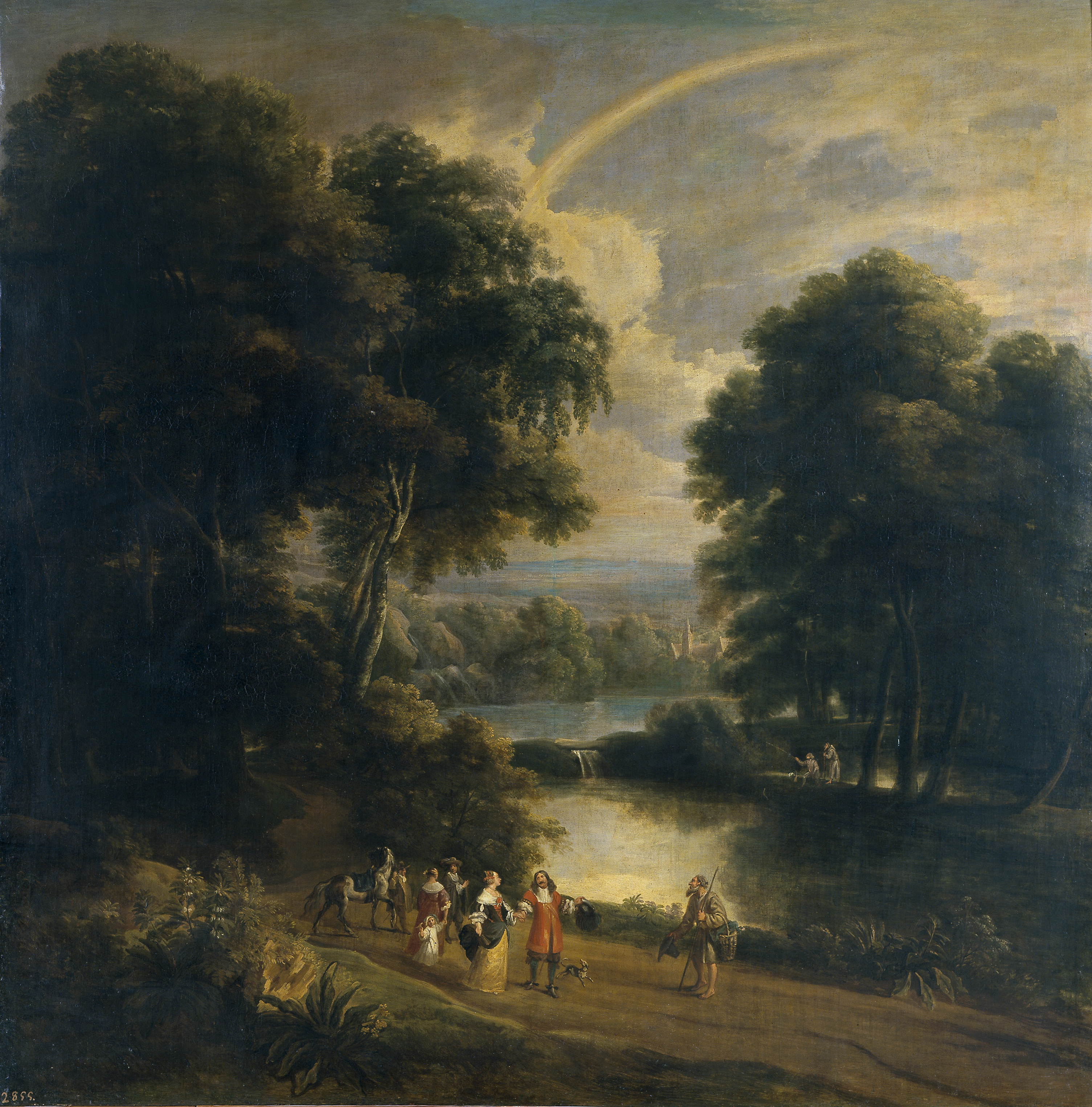 Paisaje a la orilla de un río, óleo sobre lienzo, 245 x 242 cm, Madrid, Museo del Prado